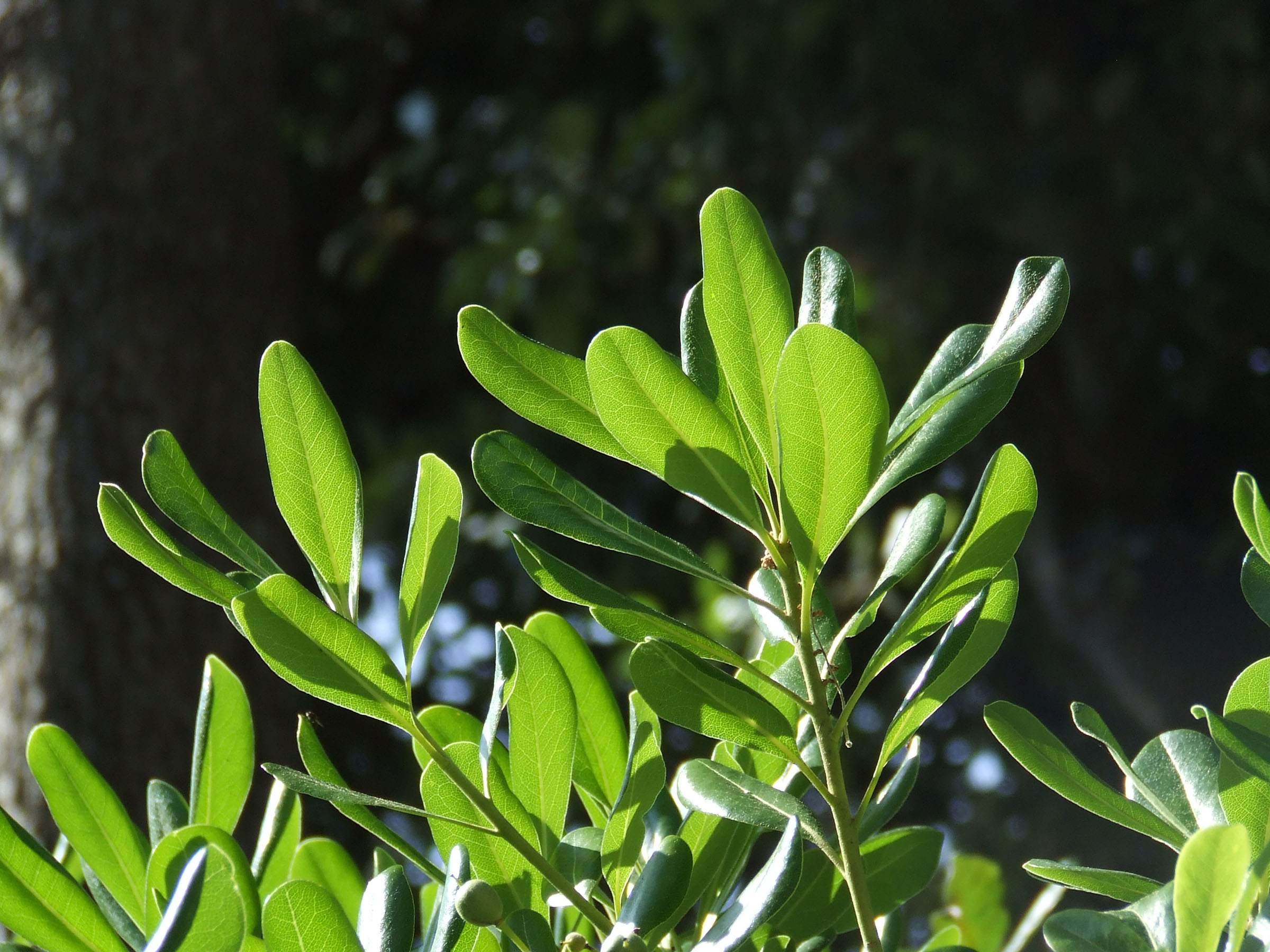 siepe di pittosporo